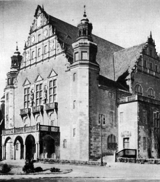 Poznań podczas okupacji niemieckiej - Uniwersytet Rzeszy, siedziba